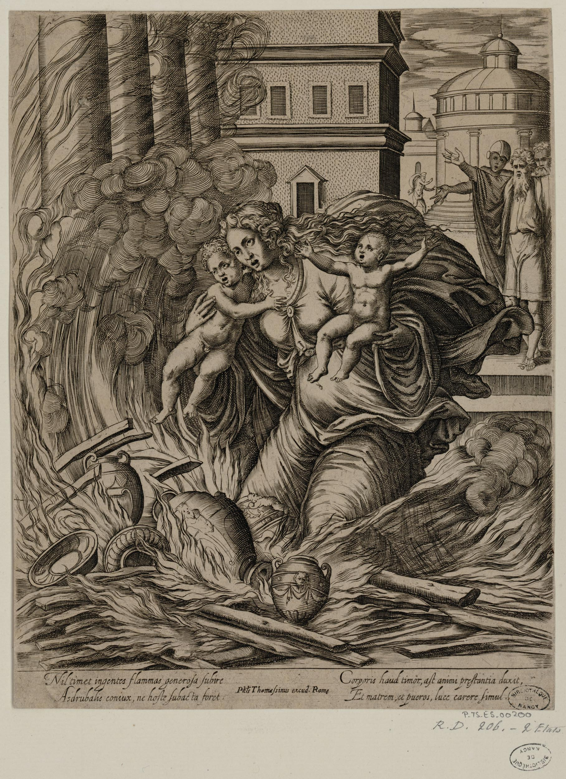 La femme d'Asdrubal se jetant avec ses deux enfants dans le bûcher. 2e état. Gravure au burin sur papier vergé. Estampe, 225 x 174 mm (feuille). Notes : Donation Thiéry-Solet. Bibliothèque-médiathèque de Nancy, P_TS_ES_00200. Plus de détails sur